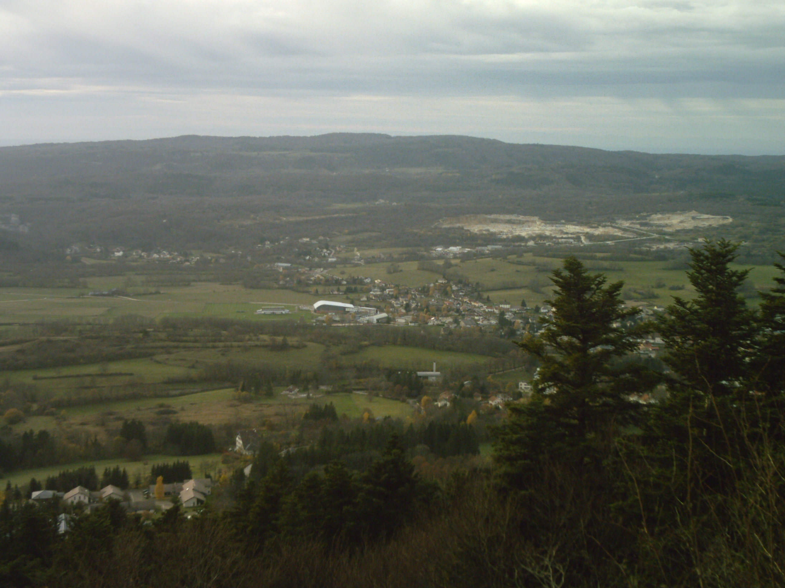 Vue générale d'Hauteville-Lompnès depuis le belvédère de Curnillon